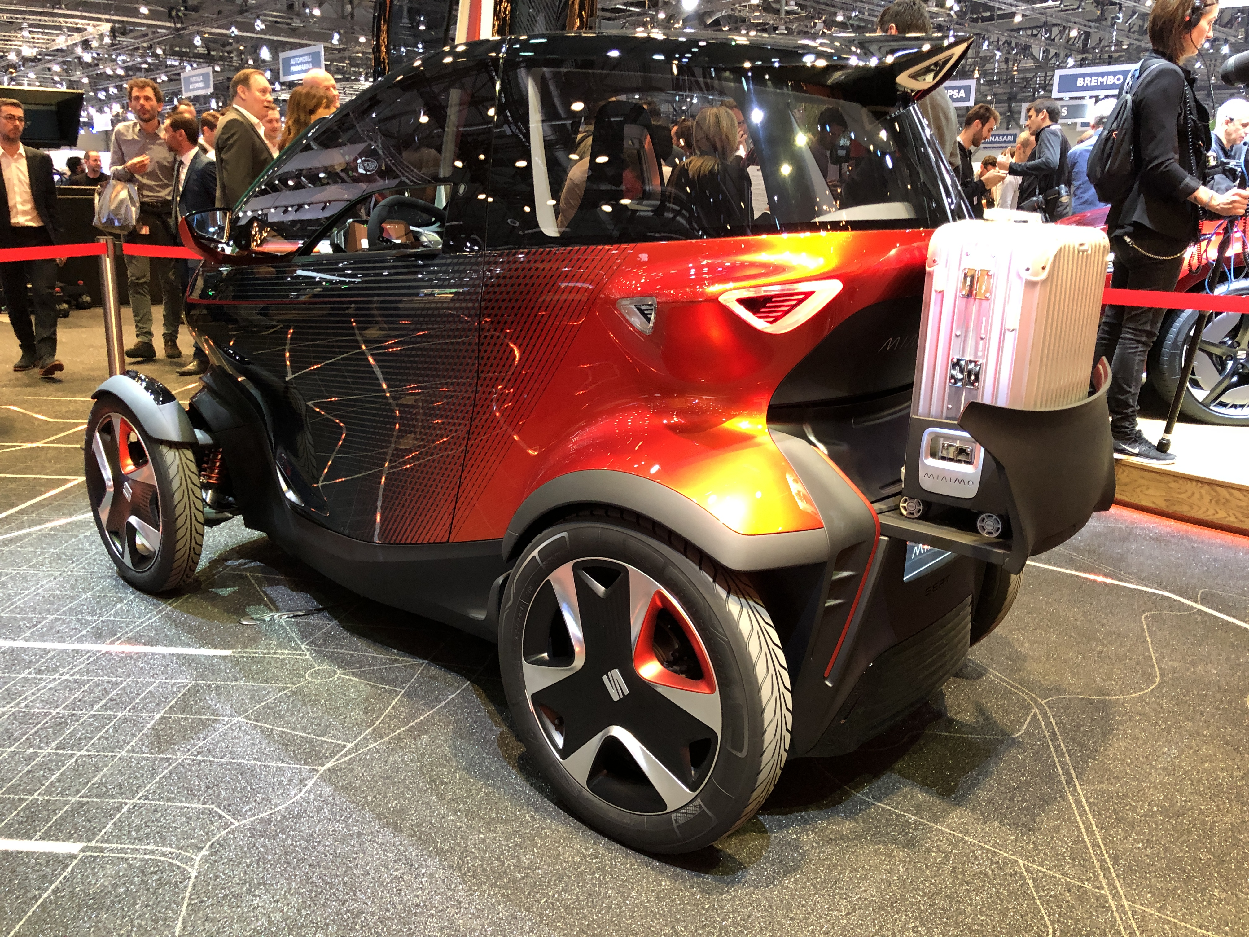 Vista trasera del SEAT Minimó, en el Salón del Automóvil de Ginera 2019.